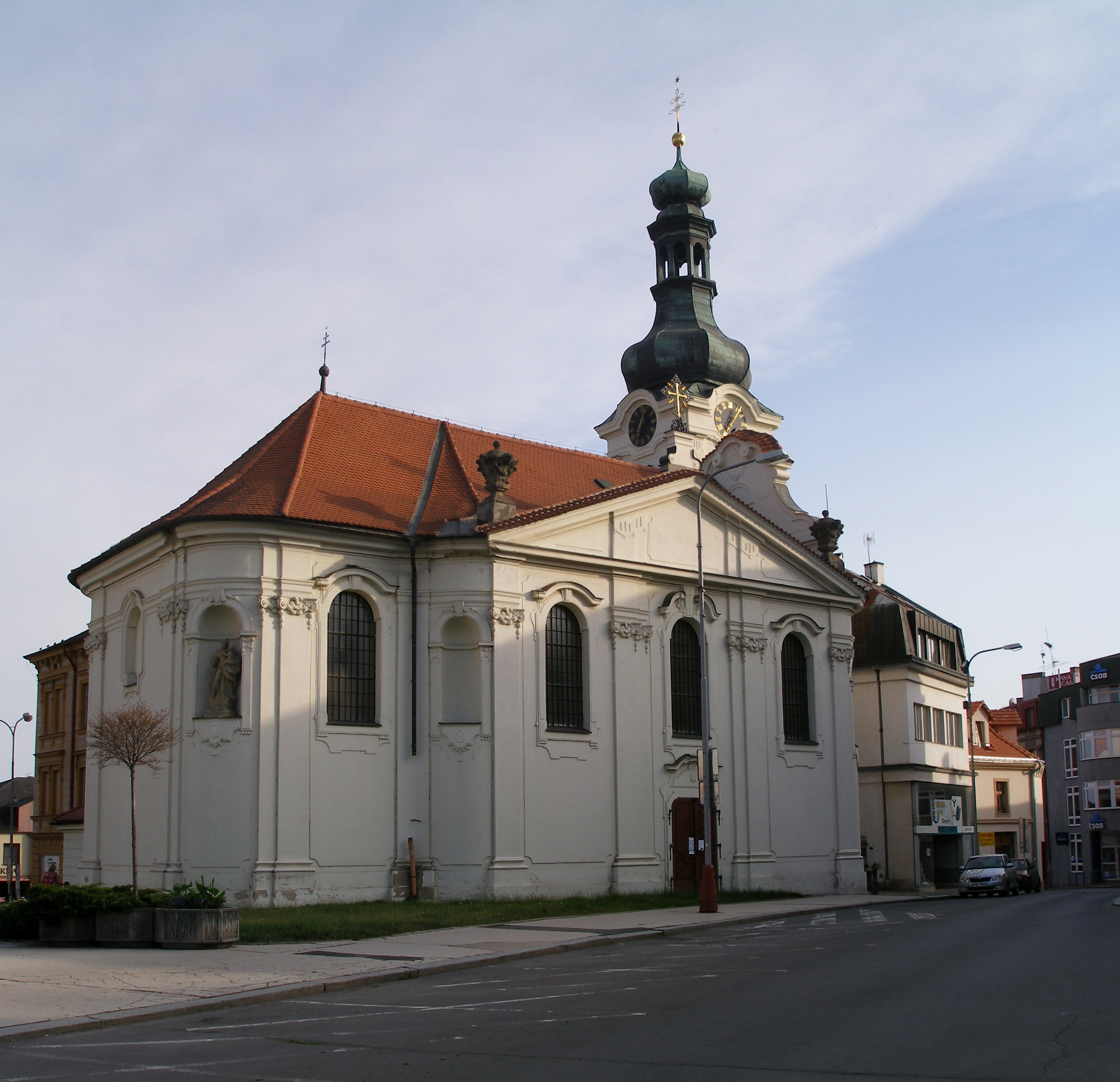 Kostel svatého Jana Nepomuckého v Mladé Boleslavi.